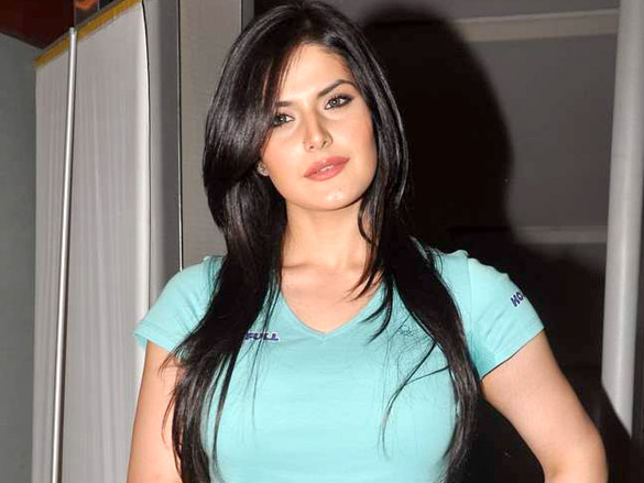 Zarine Khan at Agent Vinod screening.